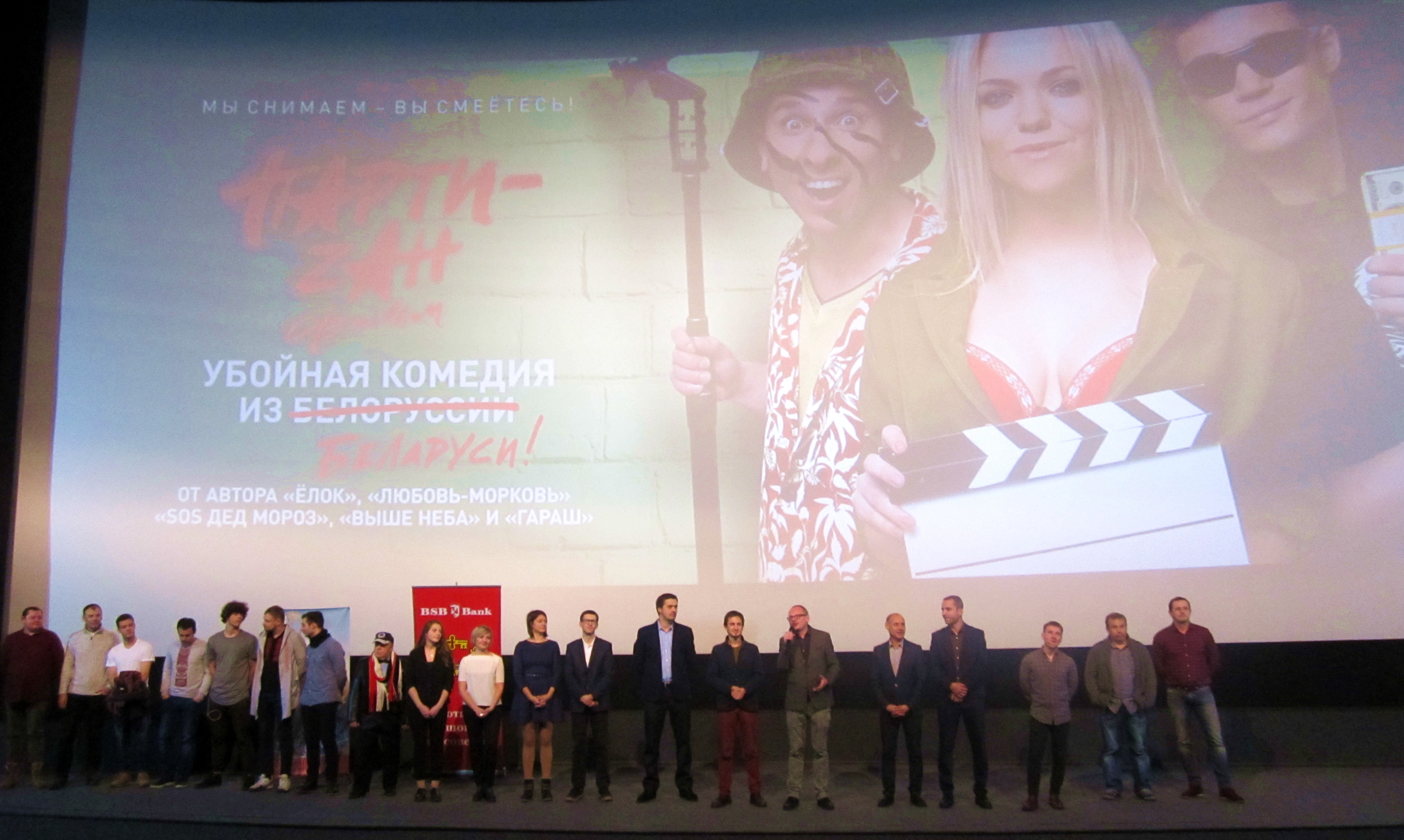 Творческая группа "PARTY-ZAN фильм" на премьерном показе ленты в к/т "Москва"